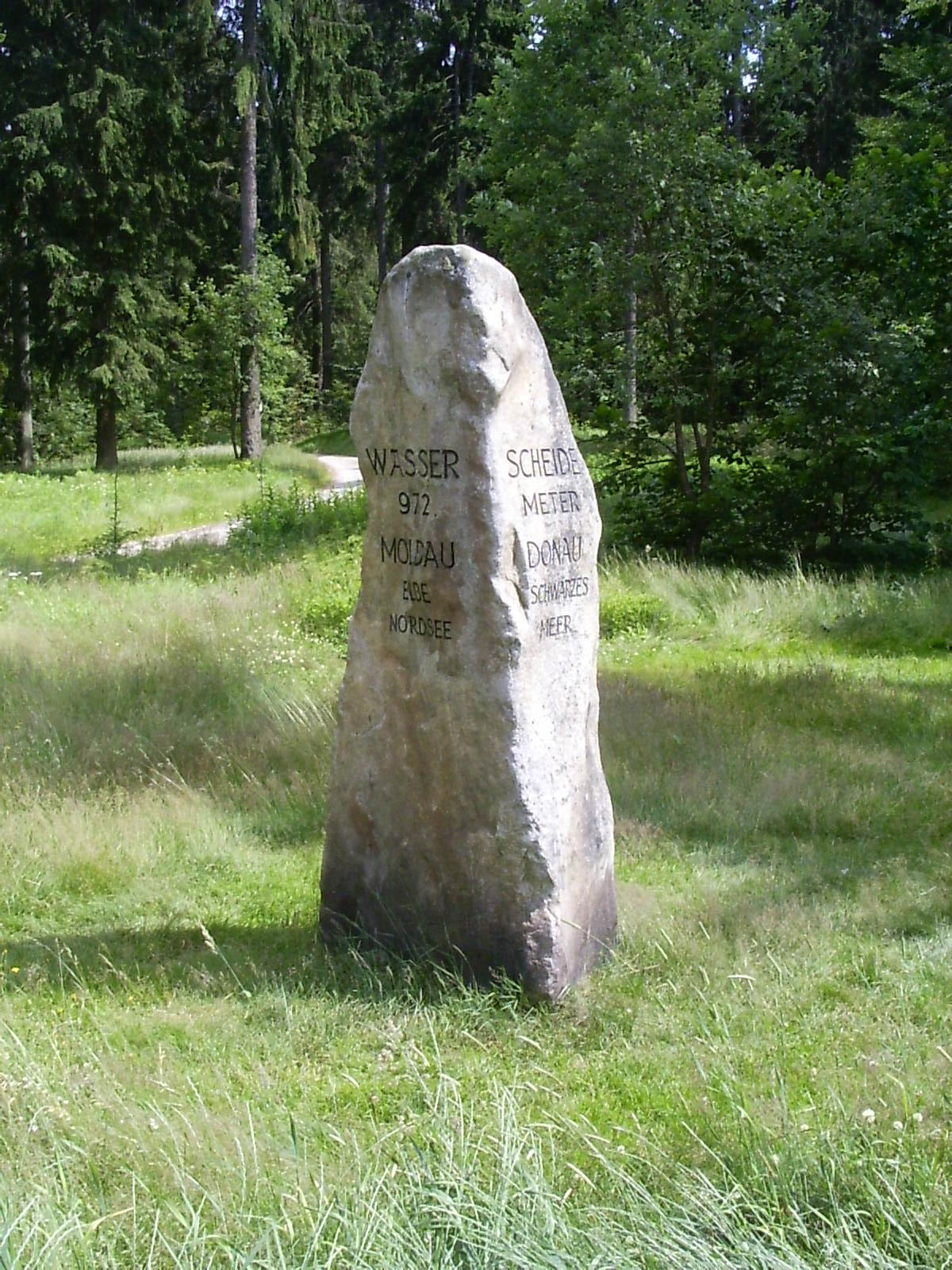 Monument für die Wasserscheide Donau-Moldau an der B12 Passau Richtung tschechische Grenze.